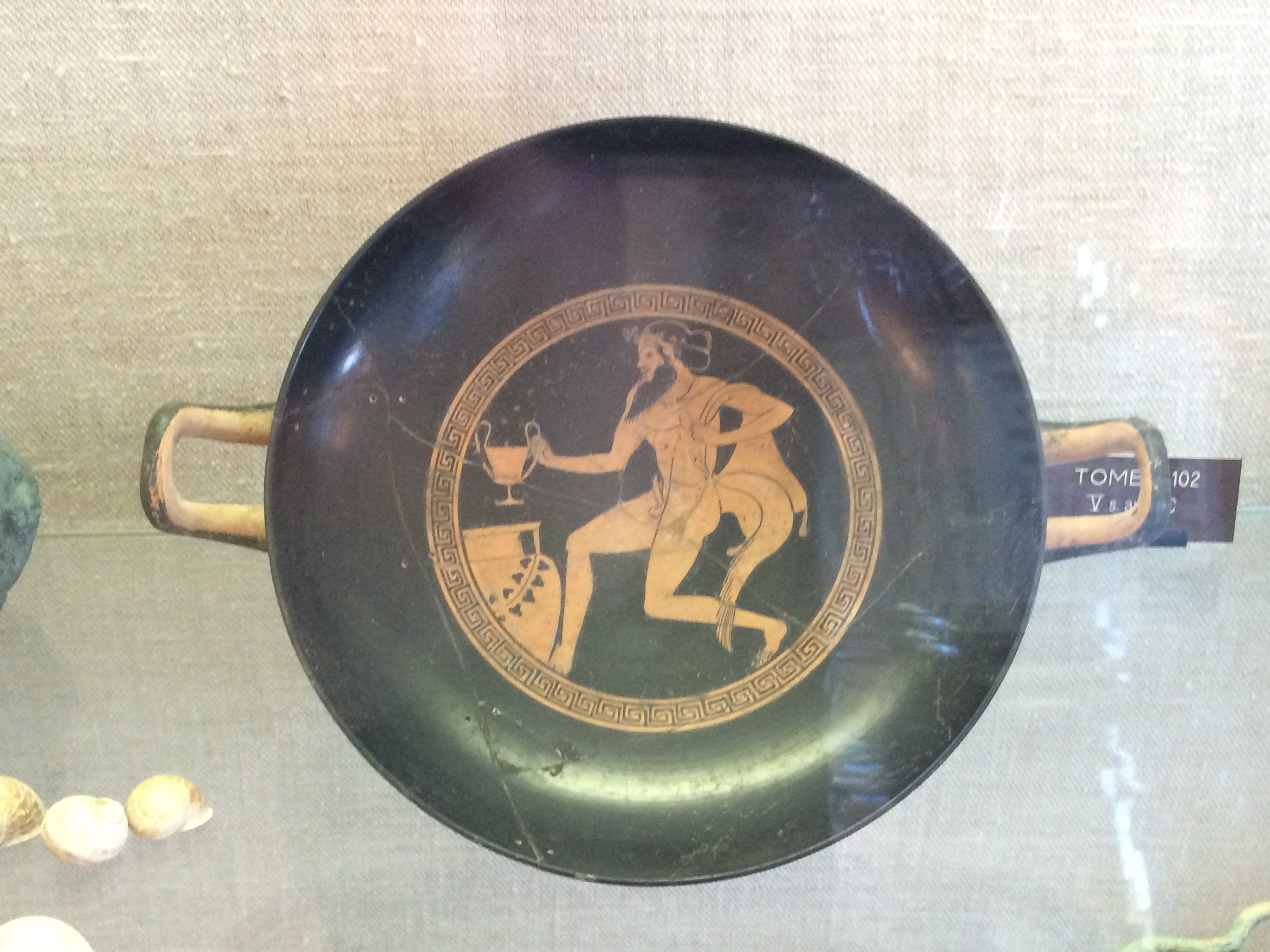 Kylix attique à figures rouges représentant un satyre